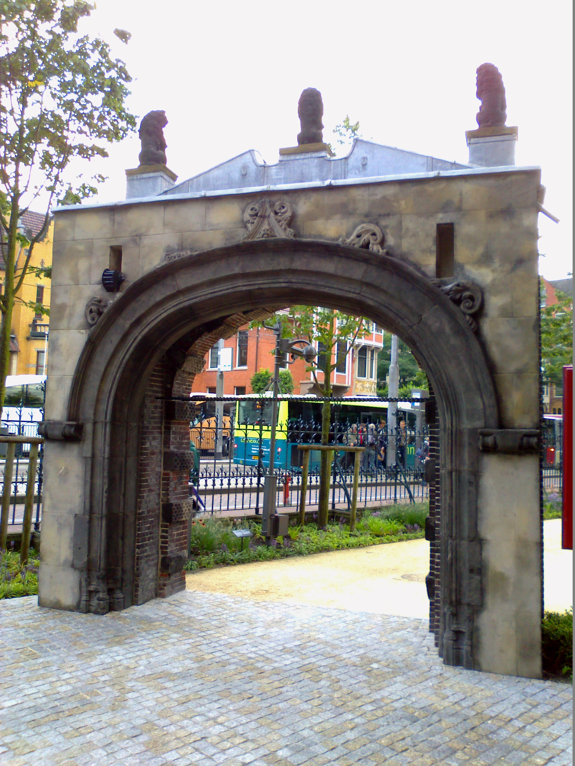 De oorspronkelijke Stadhouderspoort werd eertijds afgevoerd naar het Rijksmuseum in Amsterdam. Het is te vinden aan de achterzijde van het mueum in de tuin. Het exemlaar op het Binnenhof, zijde Buitenhof in Den Haag, is een replica.